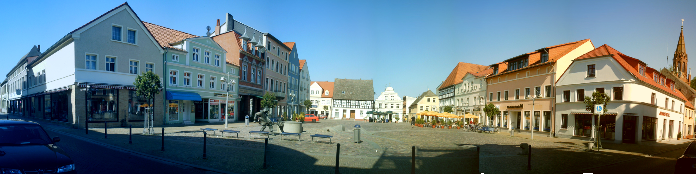 Ueckermünder Markt.